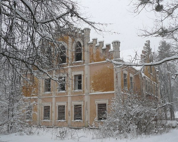 д.Павлиново, Барановичский район, усадьба Бохвицей, дворец, 1906 г., неоготика. Фото путешествия по Беларуси.